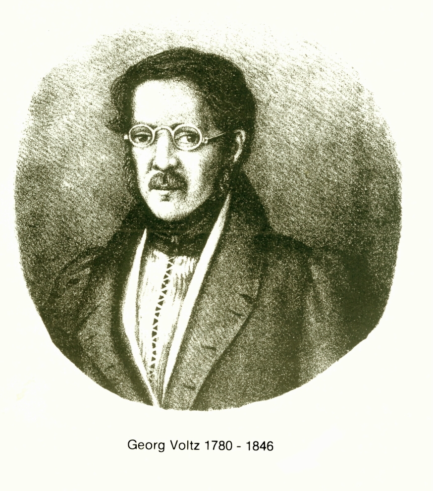 Porträt von Georg Voltz, Bürgermeister in Weißenburg in Bayern.